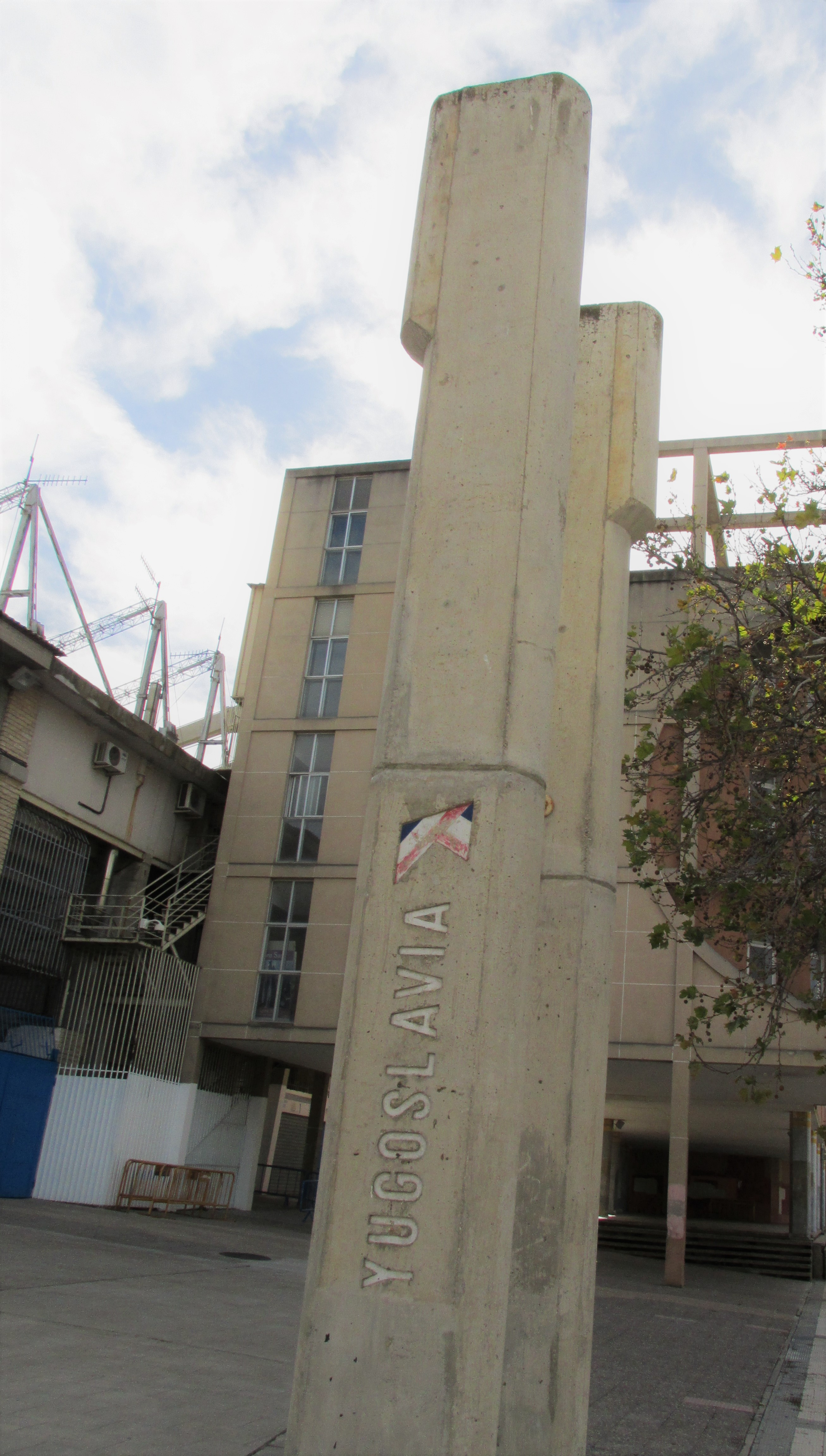 Monumento al Mundial de fútbol de España 1982 en La Romareda (Zaragoza).